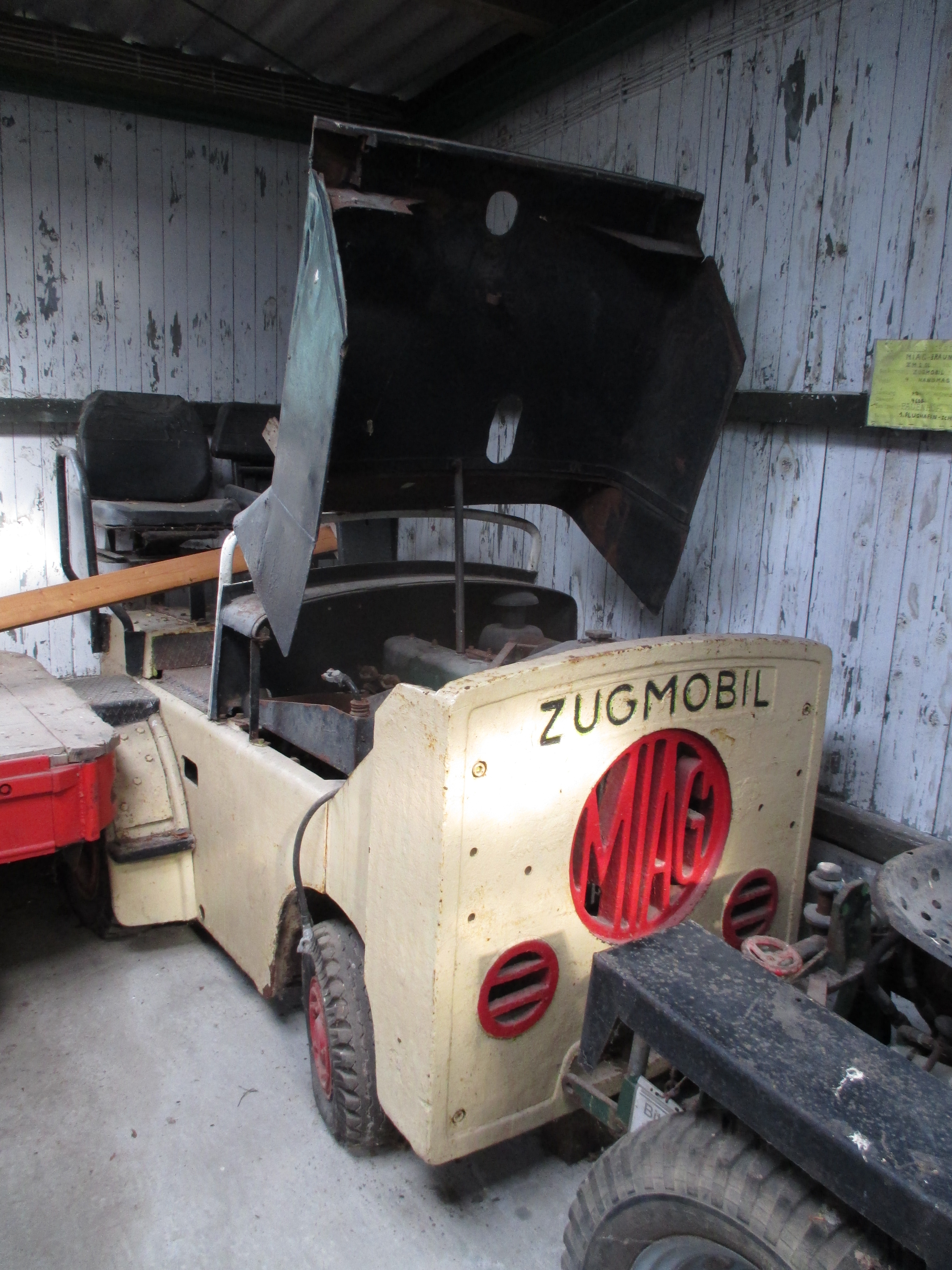 Traktoren und Landmaschinen im Traktorenmuseum Pauenhof: MIAG-Braunschweig Zugmobil ZM2DL, Baujahr:1960. 1. Flughafen-Schlepper